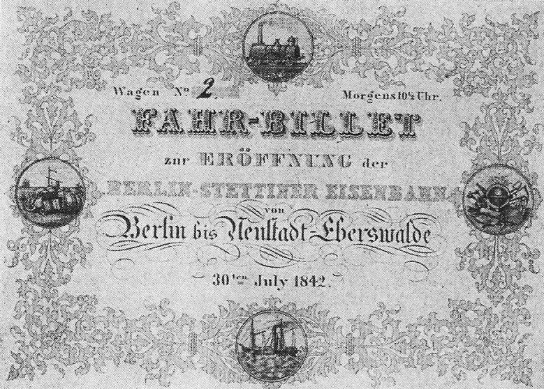 Fahr-Billet für die Eröffnungsfahrt auf der Strecke Berlin – Neustadt-Eberswalde